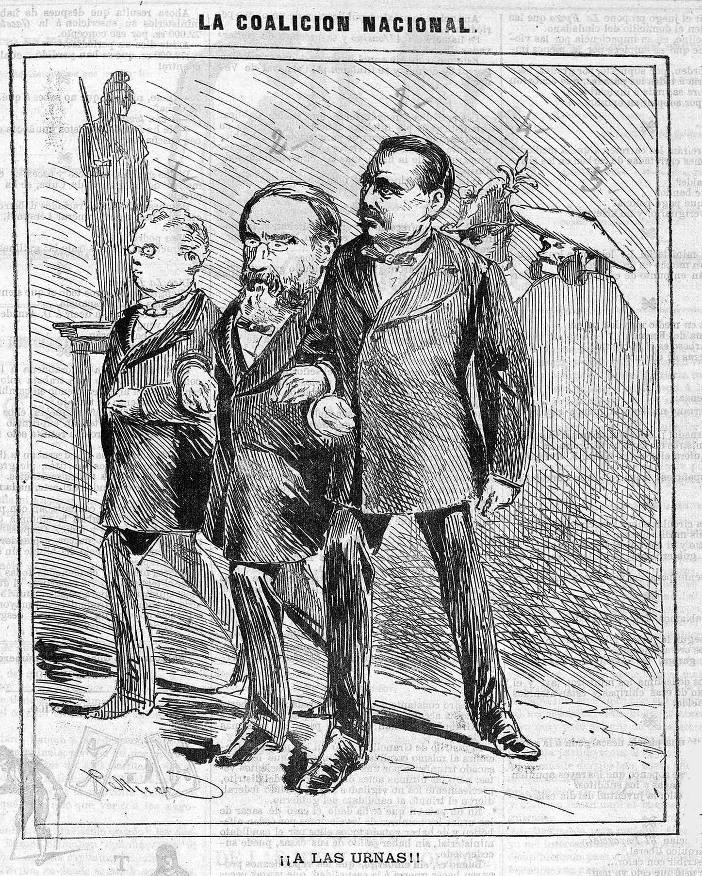 ¡A las urnas!, en la revista satírica española Gil Blas.